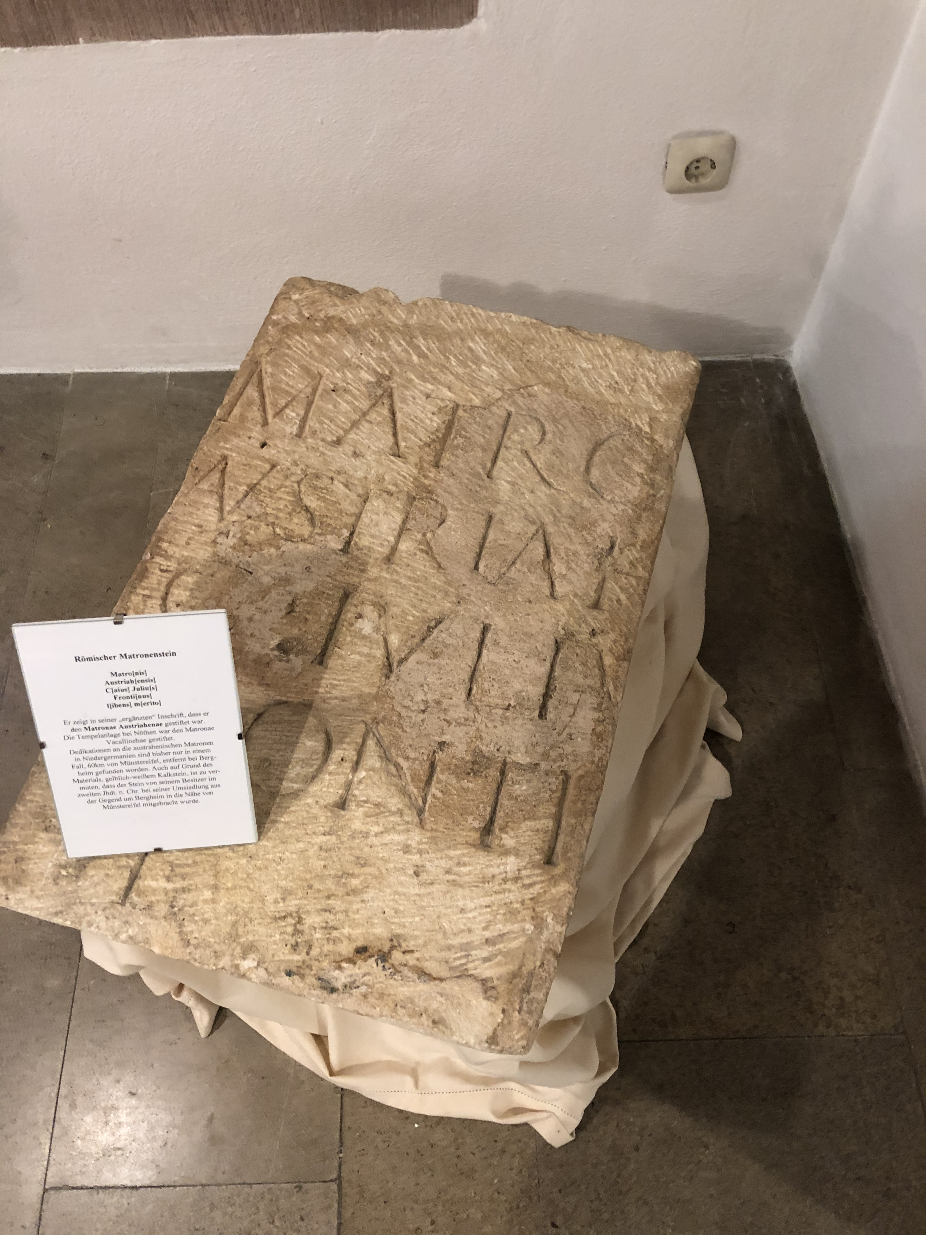 Matronenstein in St. Chrysanthus und Daria, Bad Münstereifel